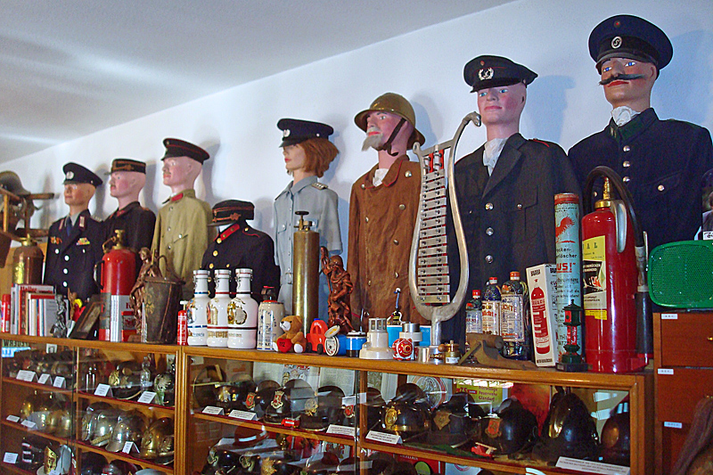 Im Feuerwehrmuseum Isselhorst, Historische Gaststätte Zur Linde, Gütersloh